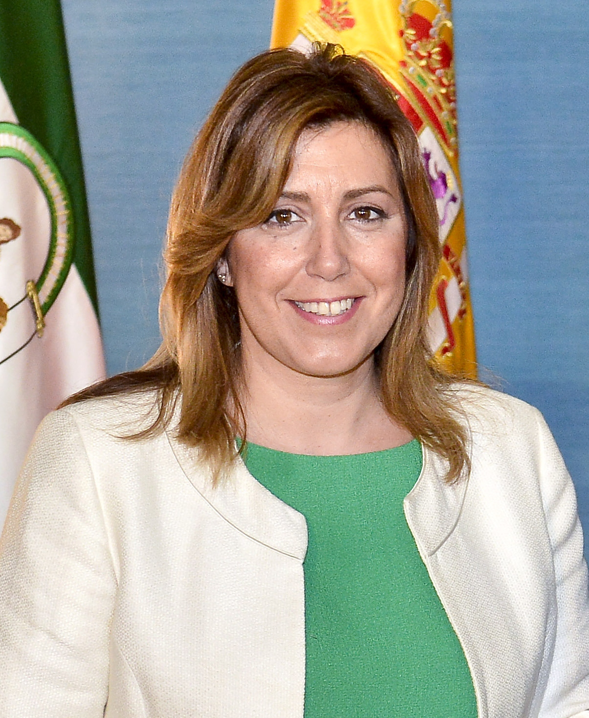 El alcalde de Sevilla Juan Ignacio Zoido Álvarez con Susana Díaz en el Palacio de San Telmo. La reunión se produjo para hablar de la recalificación de los terrenos de Altadis Referencia